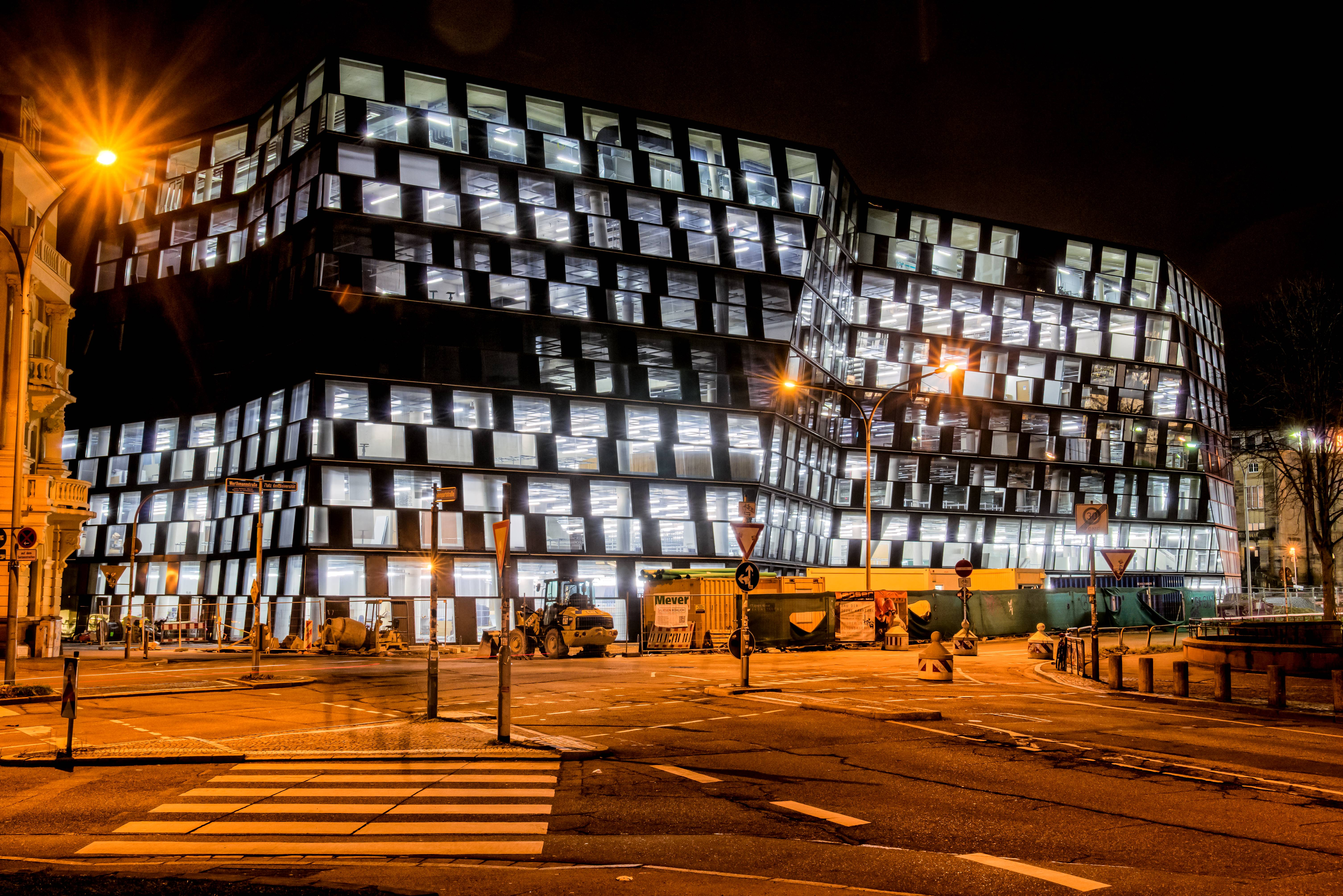 Bilder aus Freiburg im Breisgau Der Neubau Universitätsbibliothek Freiburg am 09. Februar 2015